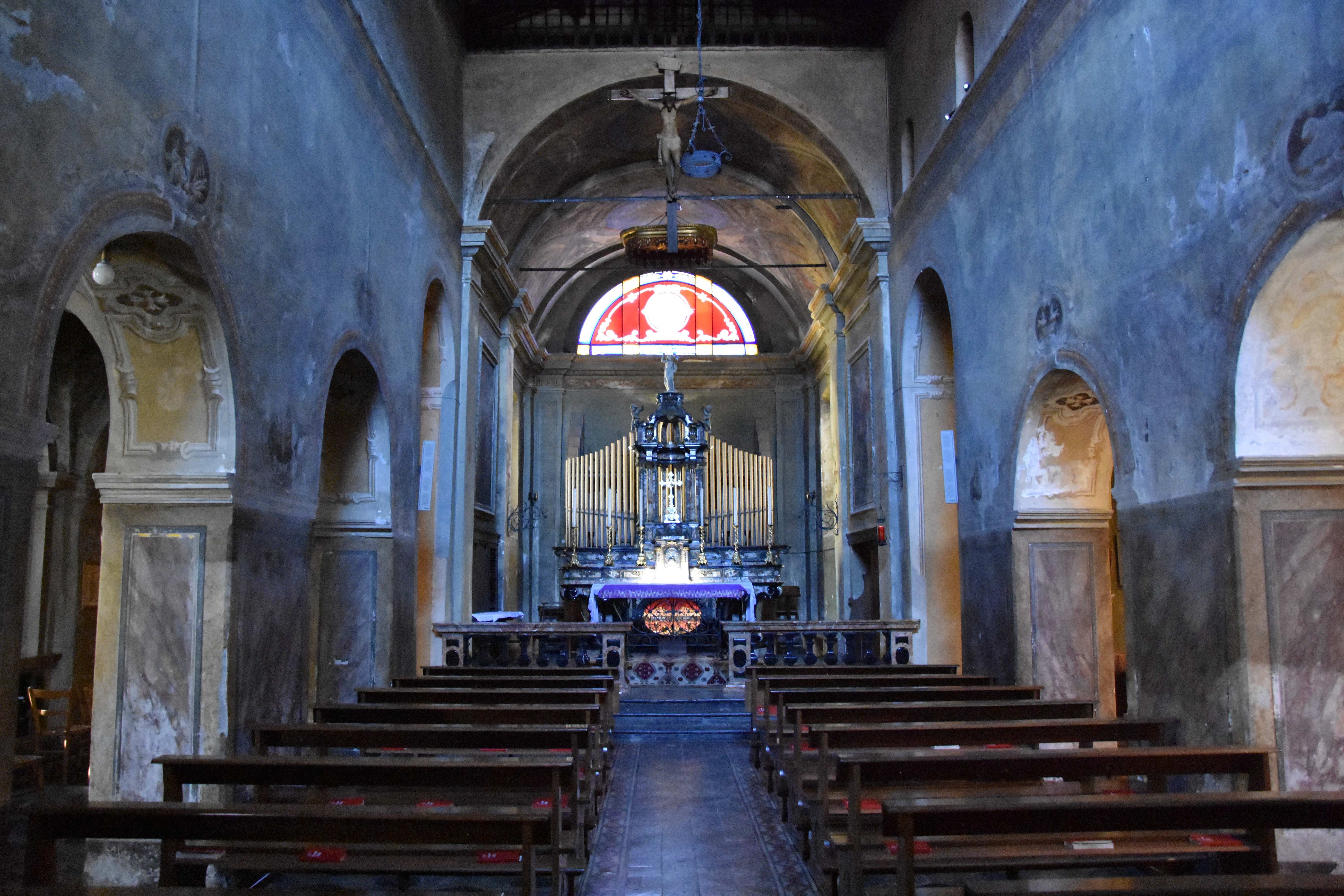 Interno della badia di San Gemolo a Ganna.